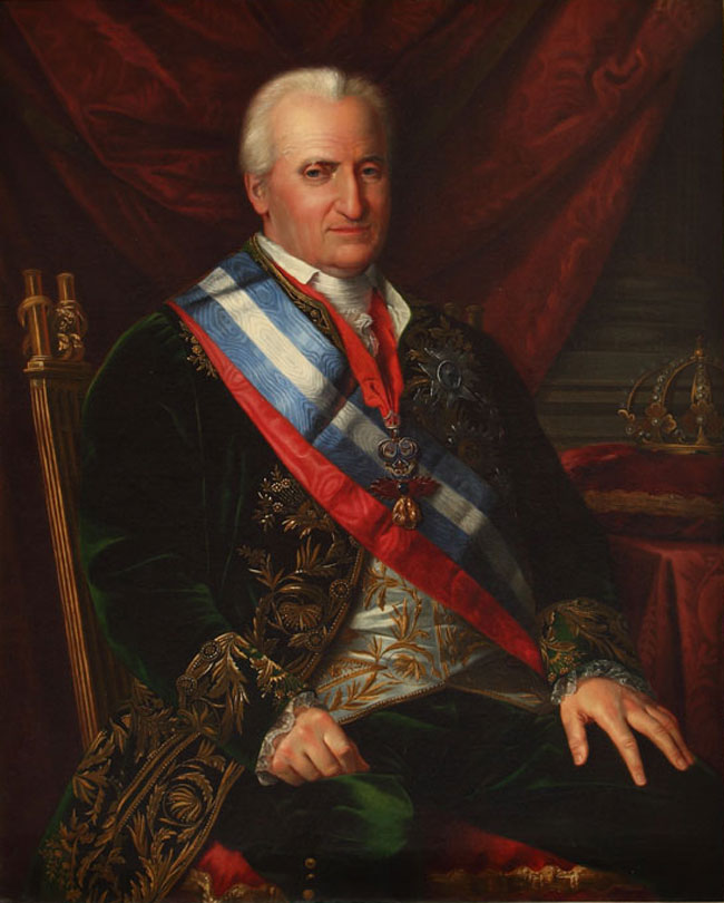 Retrato del rey Carlos IV de España (1748-1819).